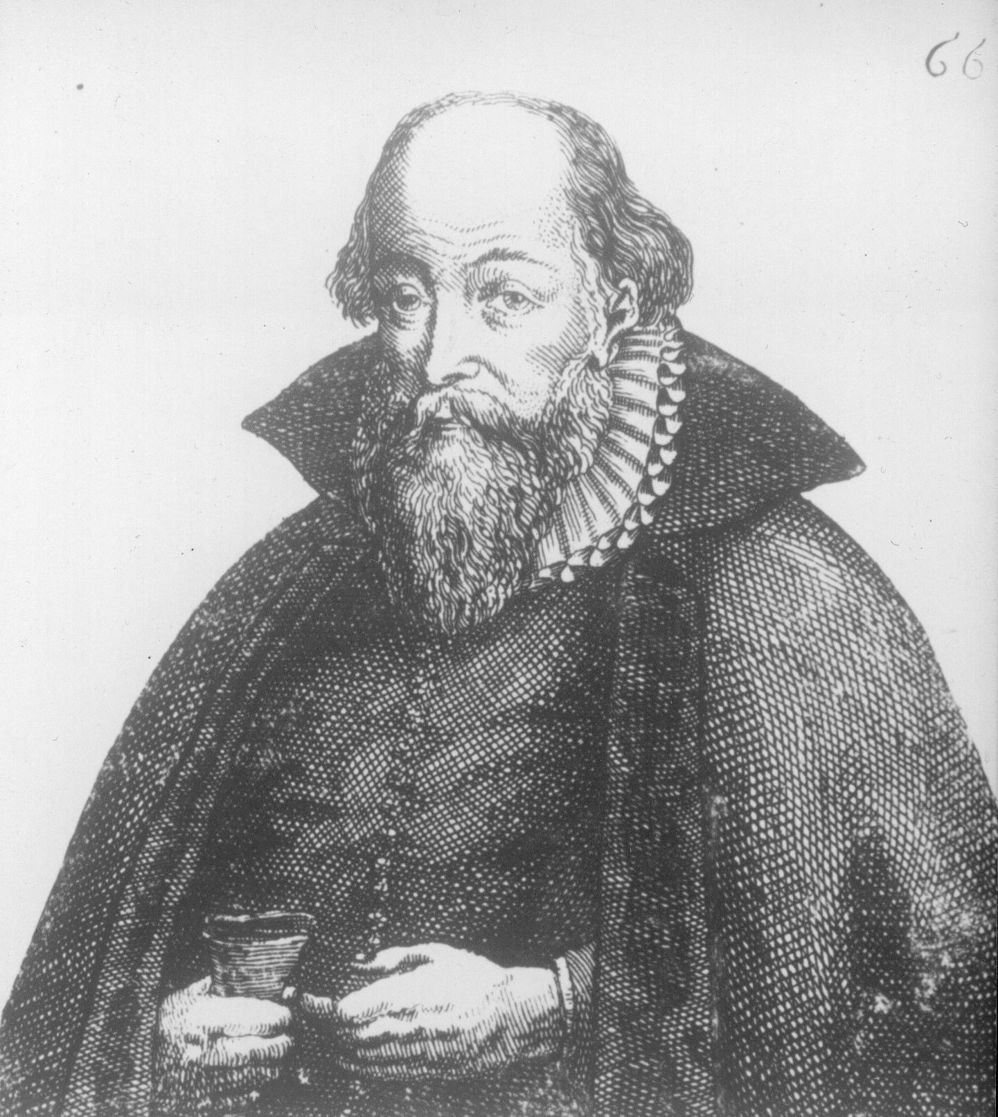 Stich von Jakob Ebert (1549–1614), deutscher Theologe